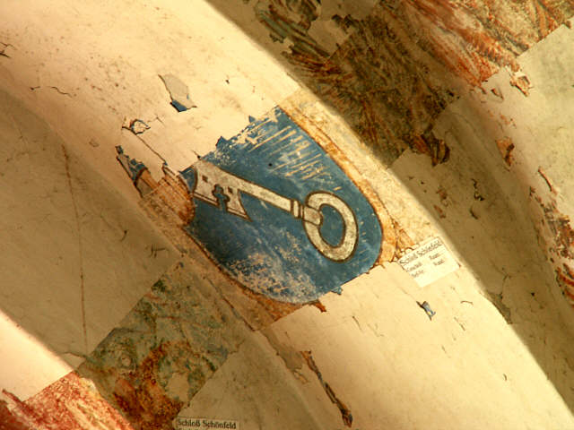 Deckenmalerei mit unbekannter Bedeutung im Schloss Schönfeld bei Dresden/Weißig